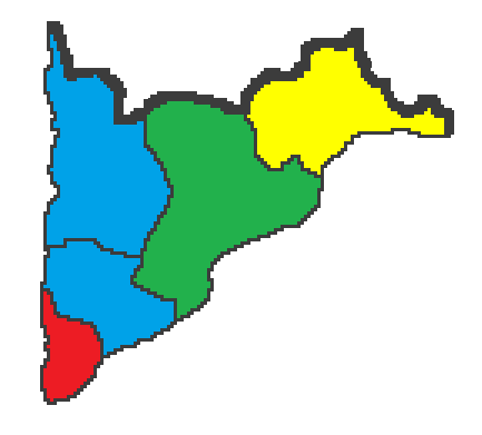 Alcaldes Baixo Miño.